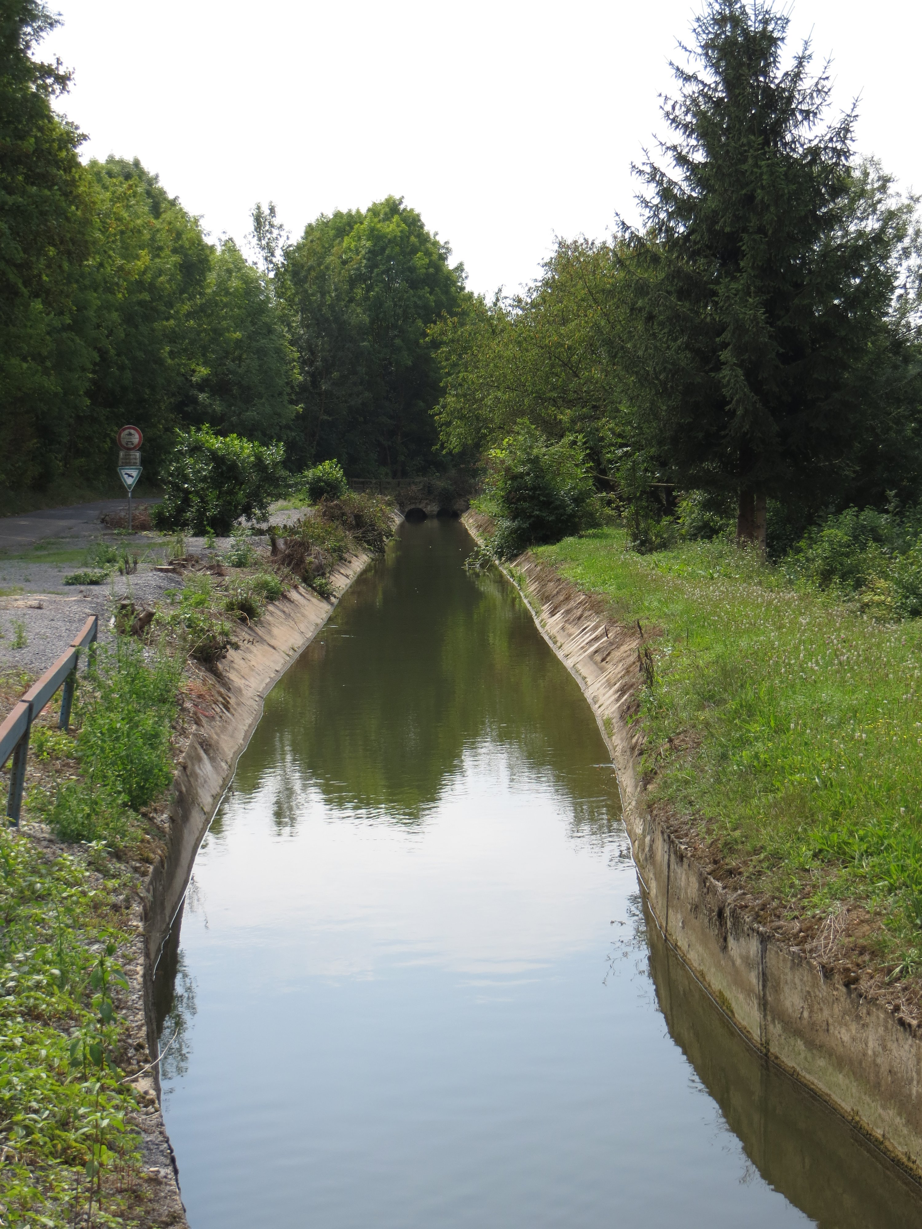 Teil des Mühlkanals der alten Rahmer-Mühle von 1774 in Heilbronn-Sontheim